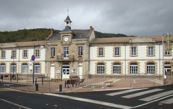 Mairie du Bousquet-d'Orb (Hérault)